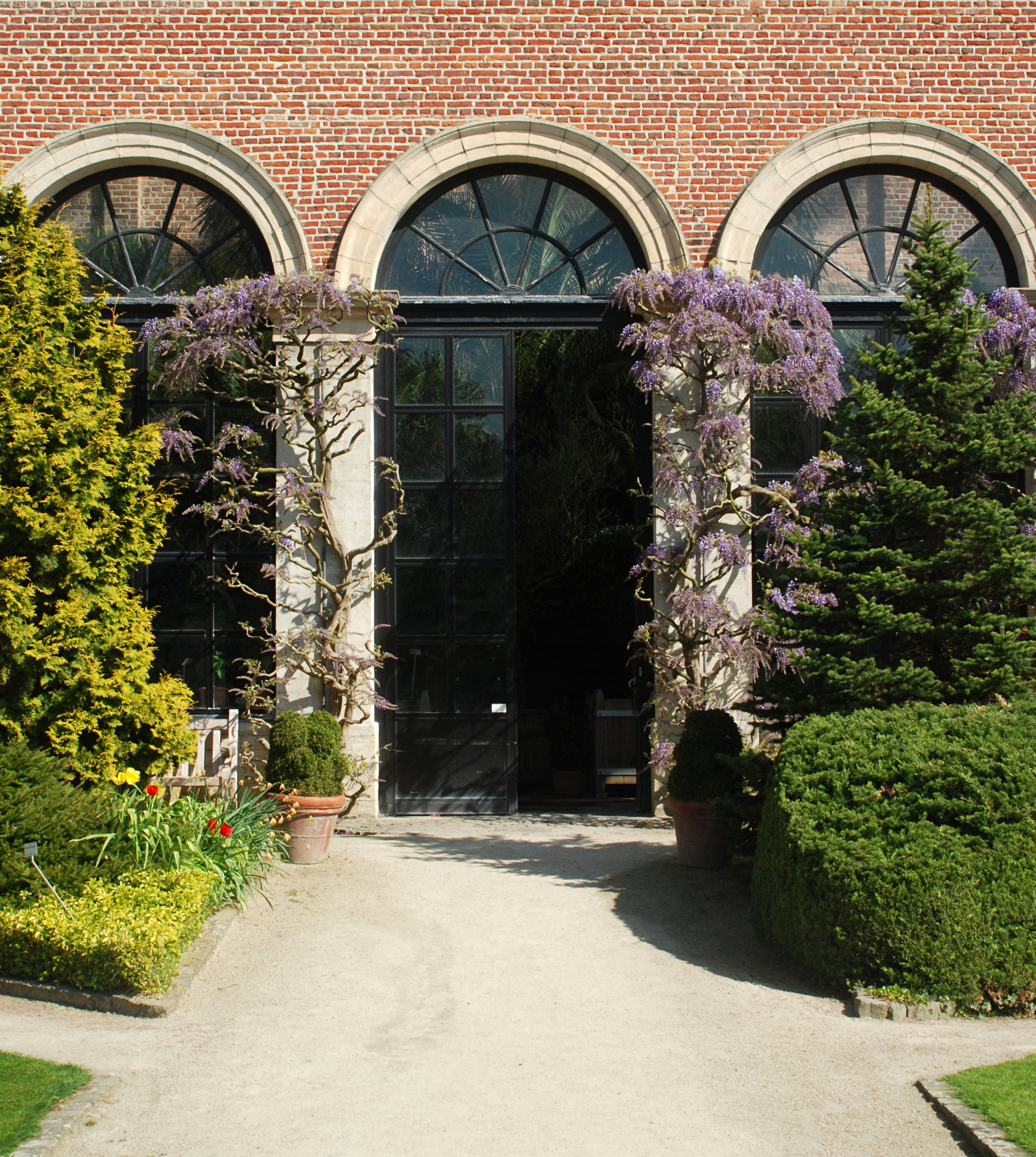 Belgique - Louvain - Jardin botanique (Kruidtuin) - orangerie néo-classique (architecte Charles Vander Straeten - 1821)